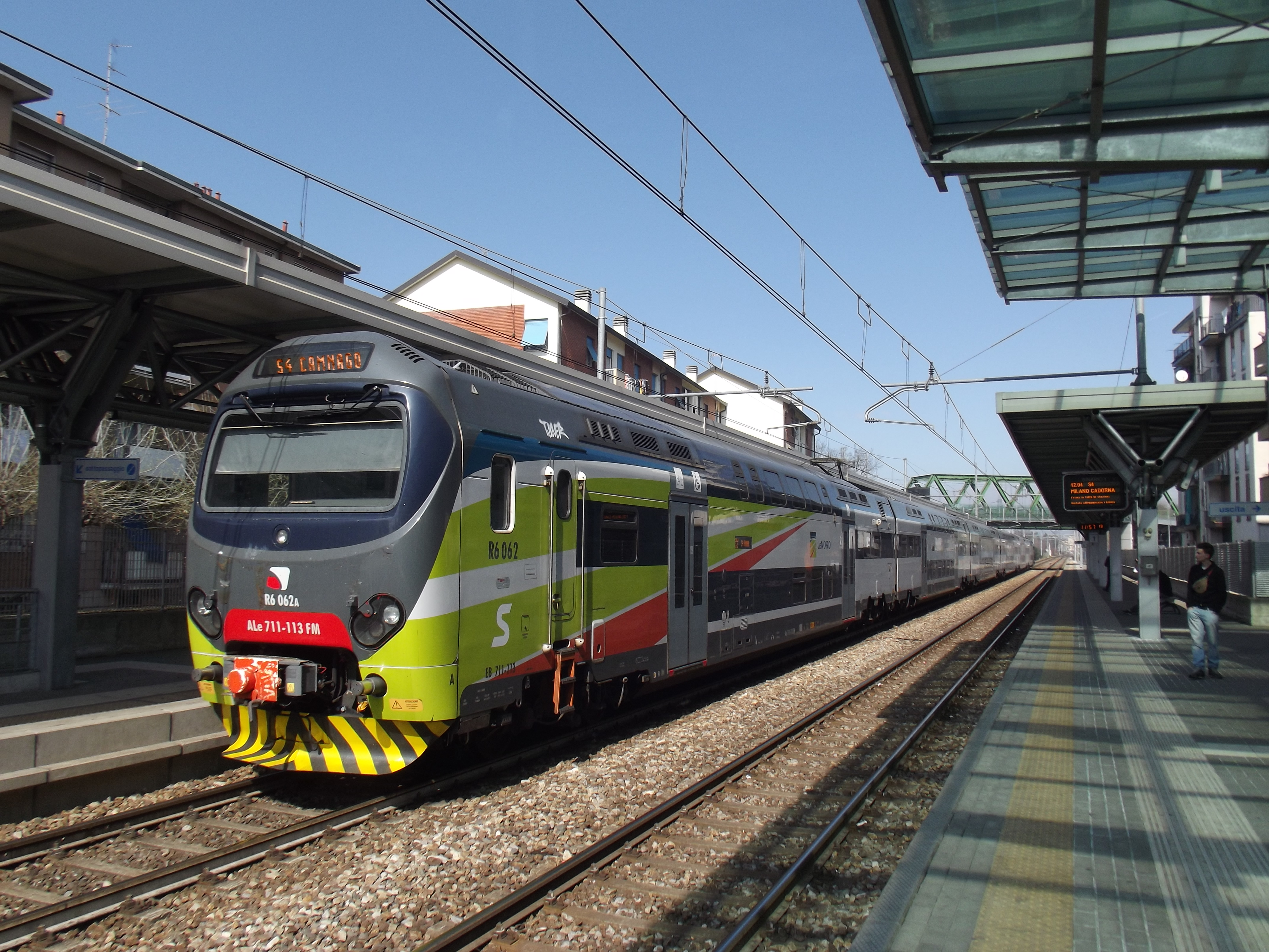 Treno tipo TSR delle Ferrovie Nord Milano in servizio sulla linea S4, in sosta a Cesano Maderno.